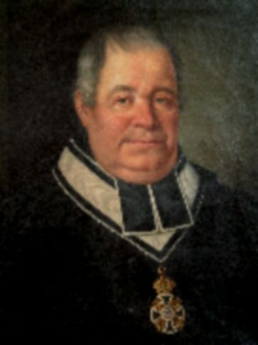 Ignaz Anton Demeter 1773-1842 Erzbischof von Freiburg (1836-1842)